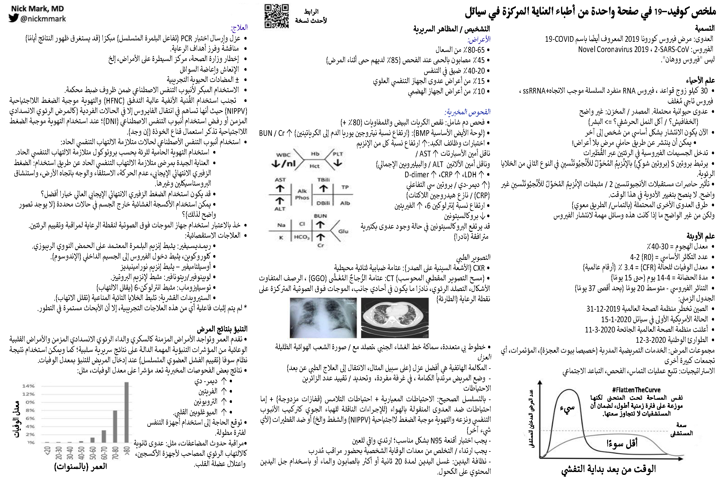 ملخص كوفيد-19 في صفحة واحدة من أطباء العناية المركزة في سياتل من ترجمة فريق نادي المحتوى العربي في الجامعة الهاشمية وجرافيك الزميل محمد حجاوي